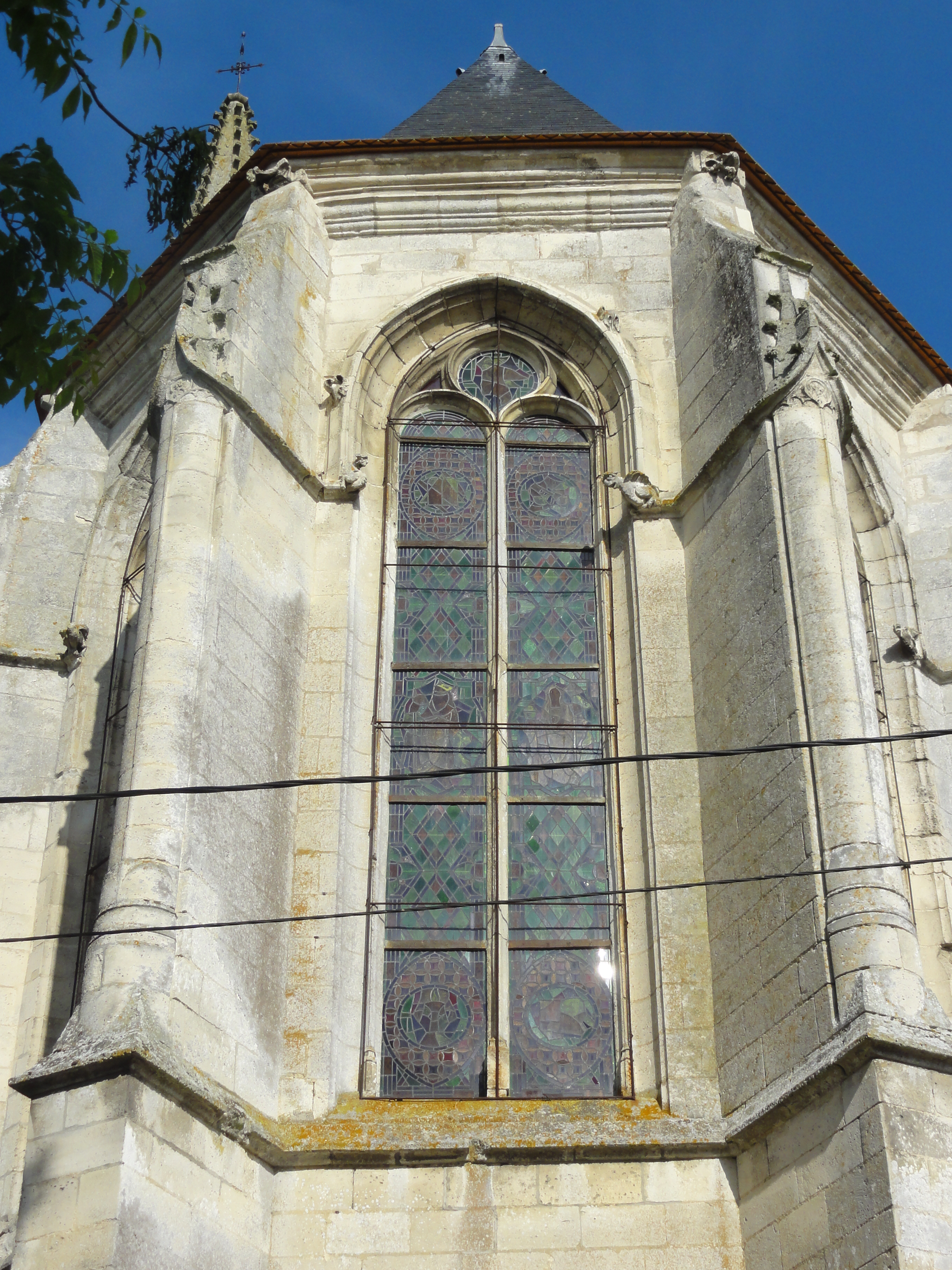 Église Saint-Martin de Versigny (voir titre).